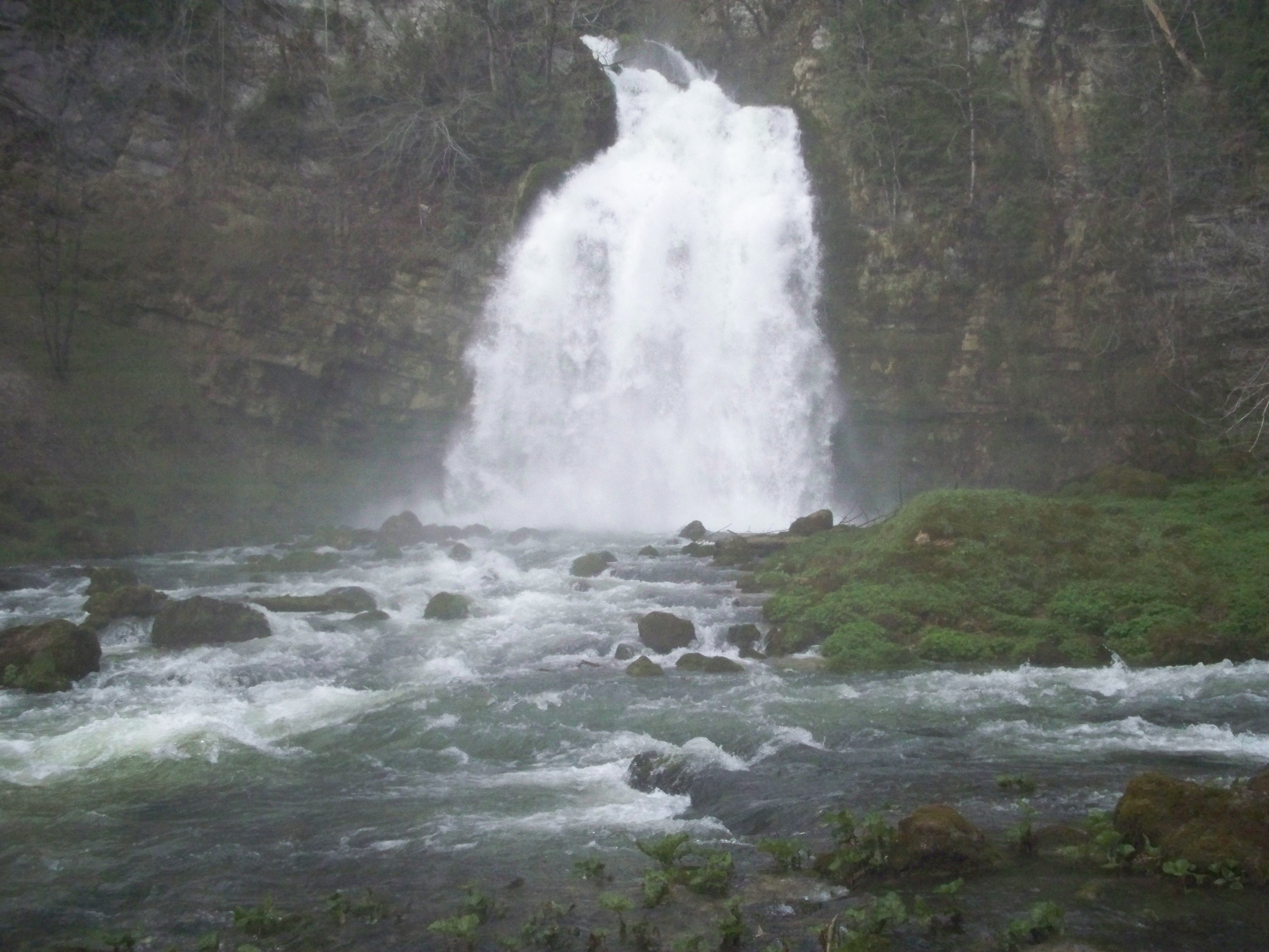 Cascades du Flumen, cours d'eau du massif du Jura